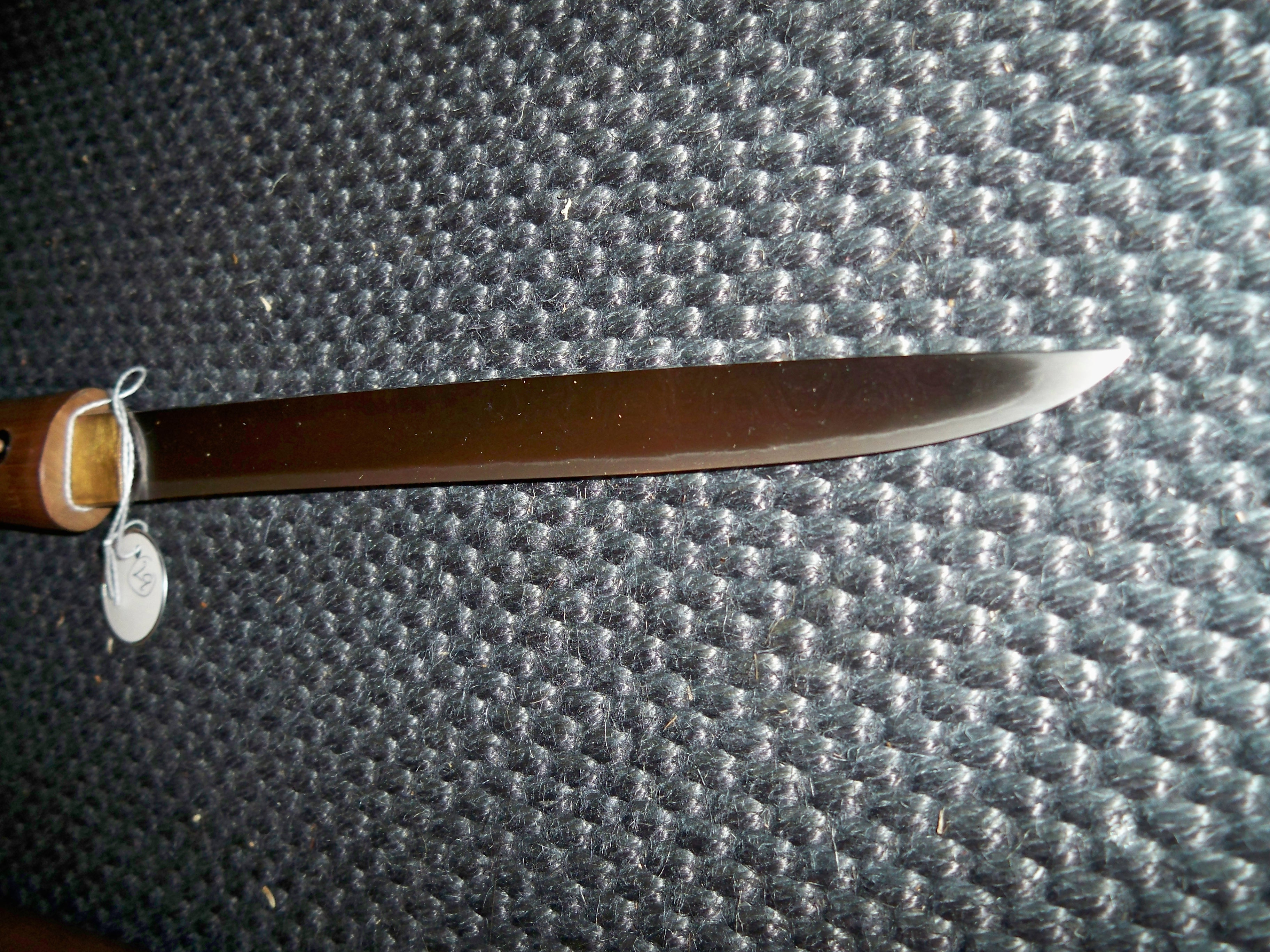 Antique Japanese yoroi doshi style tanto blade.